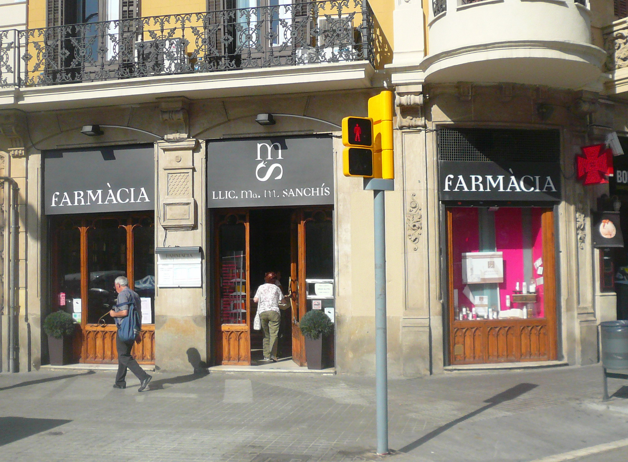 Farmàcia Tanganelli (Barcelona)